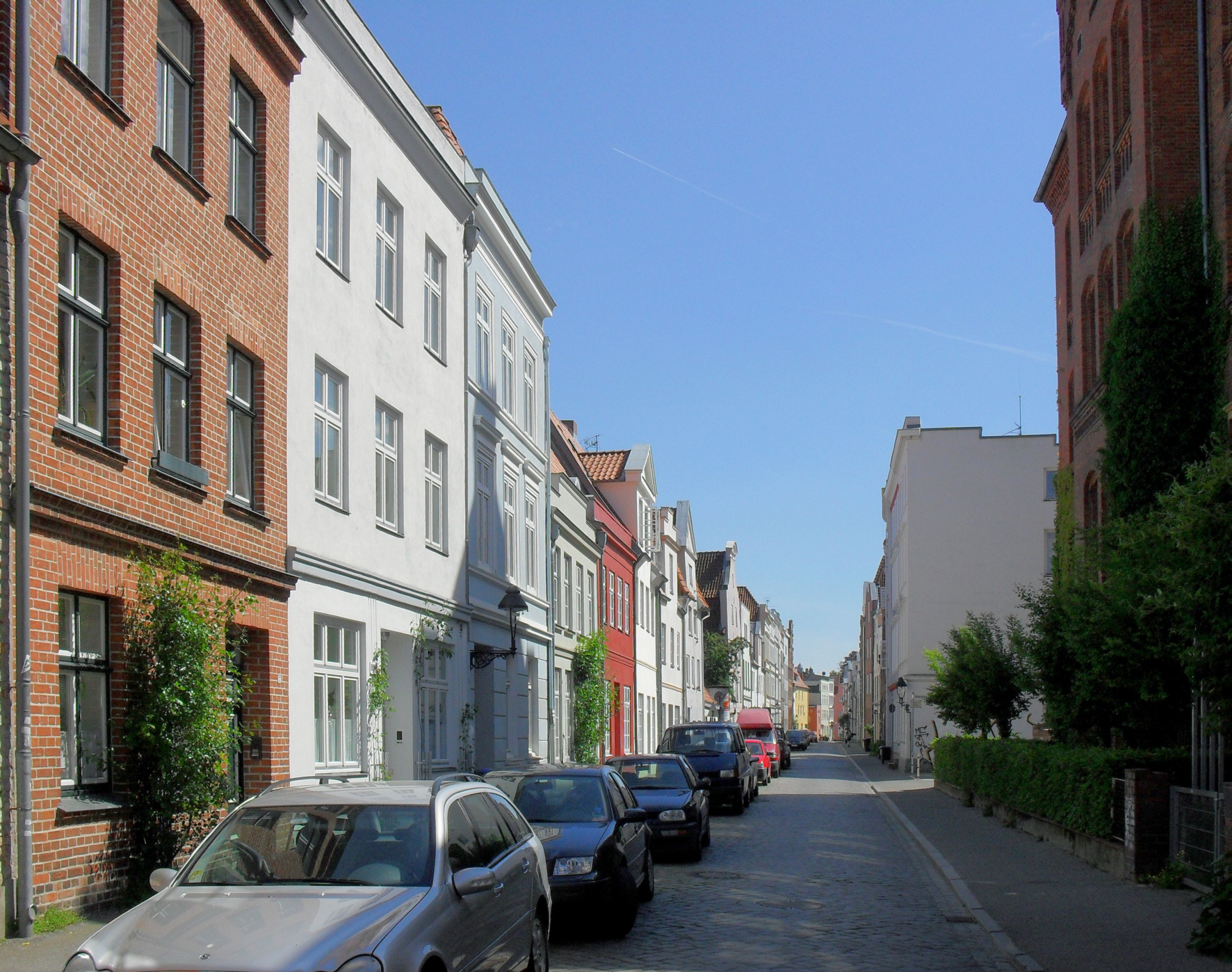 Der Lange Lohberg in Lübeck